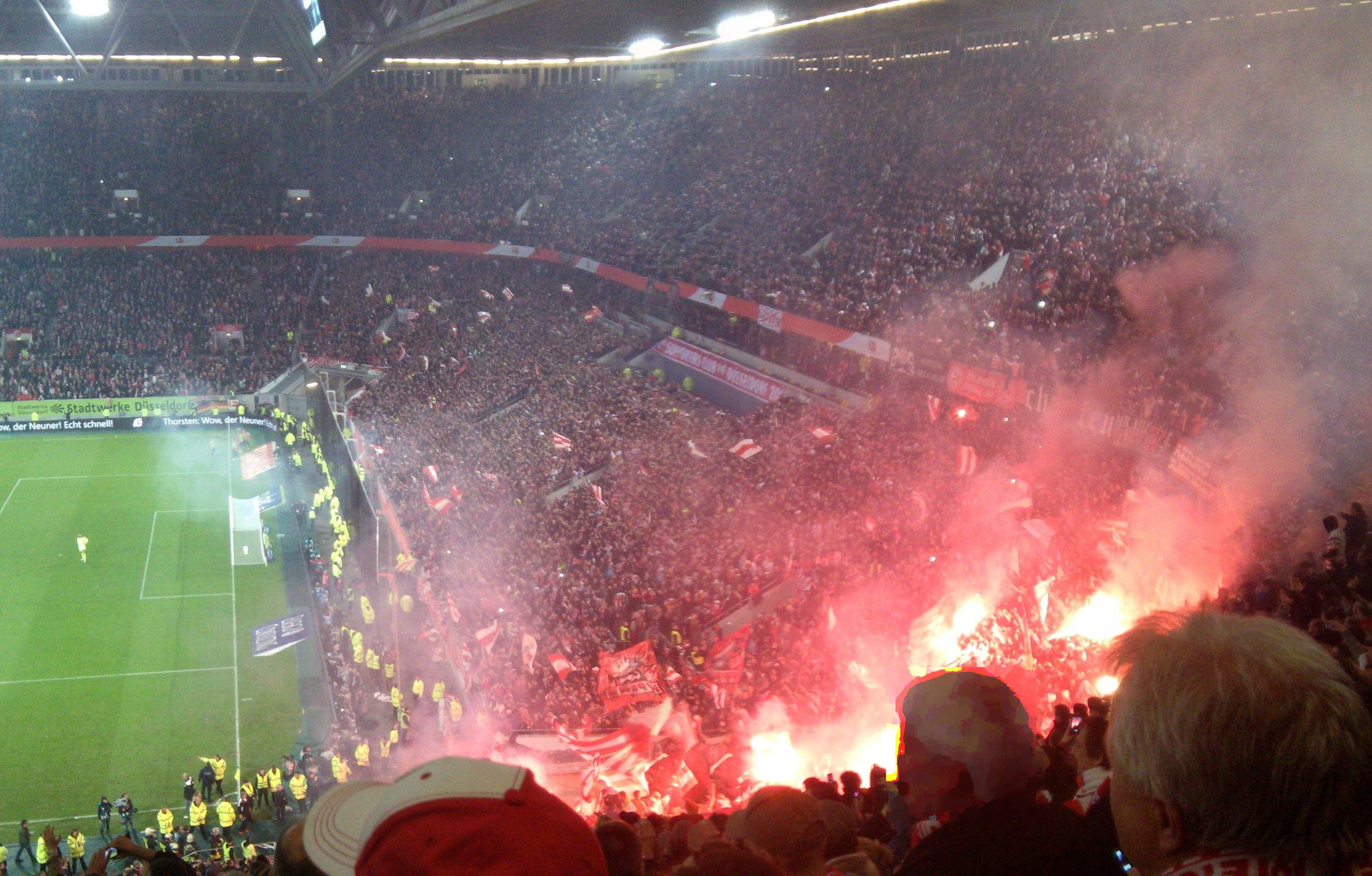 Fußballrelegationsspiel zwischen Fortuna Düsseldorf und Hertha BSC Berlin am 15.5.2012 im Düsseldorfer Stadion, Ca. 62. Spielminute. Im Bild die Fortunafankurve. Gestitchte Aufnahme, unten rechts verfremdet